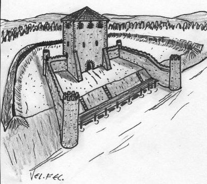 Rekonstruktionsversuch des Ländeburgus Neuwied-Engers (D), Zustand im 4. Jhdt. n. Chr.